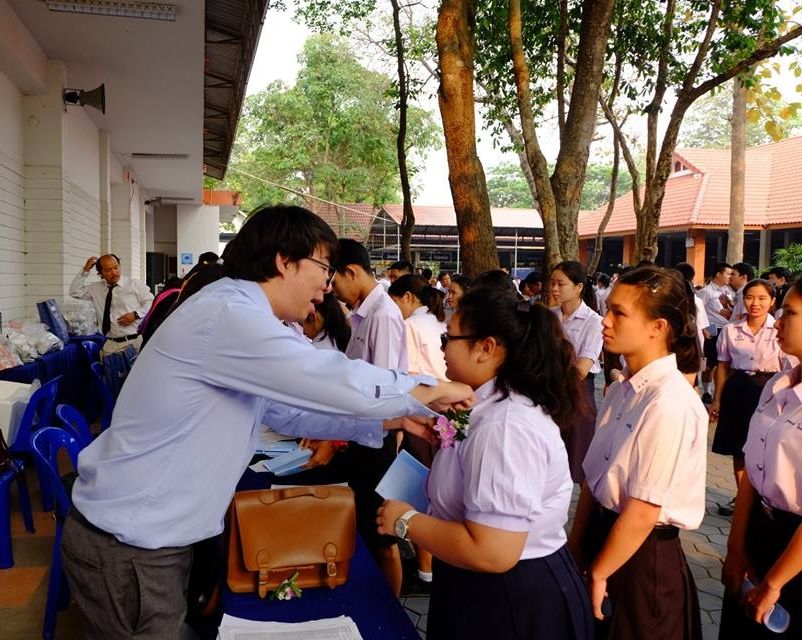 ในพิธีปัจฉิมนิเทศและจบหลักสูตร ปีการศึกษา 2560